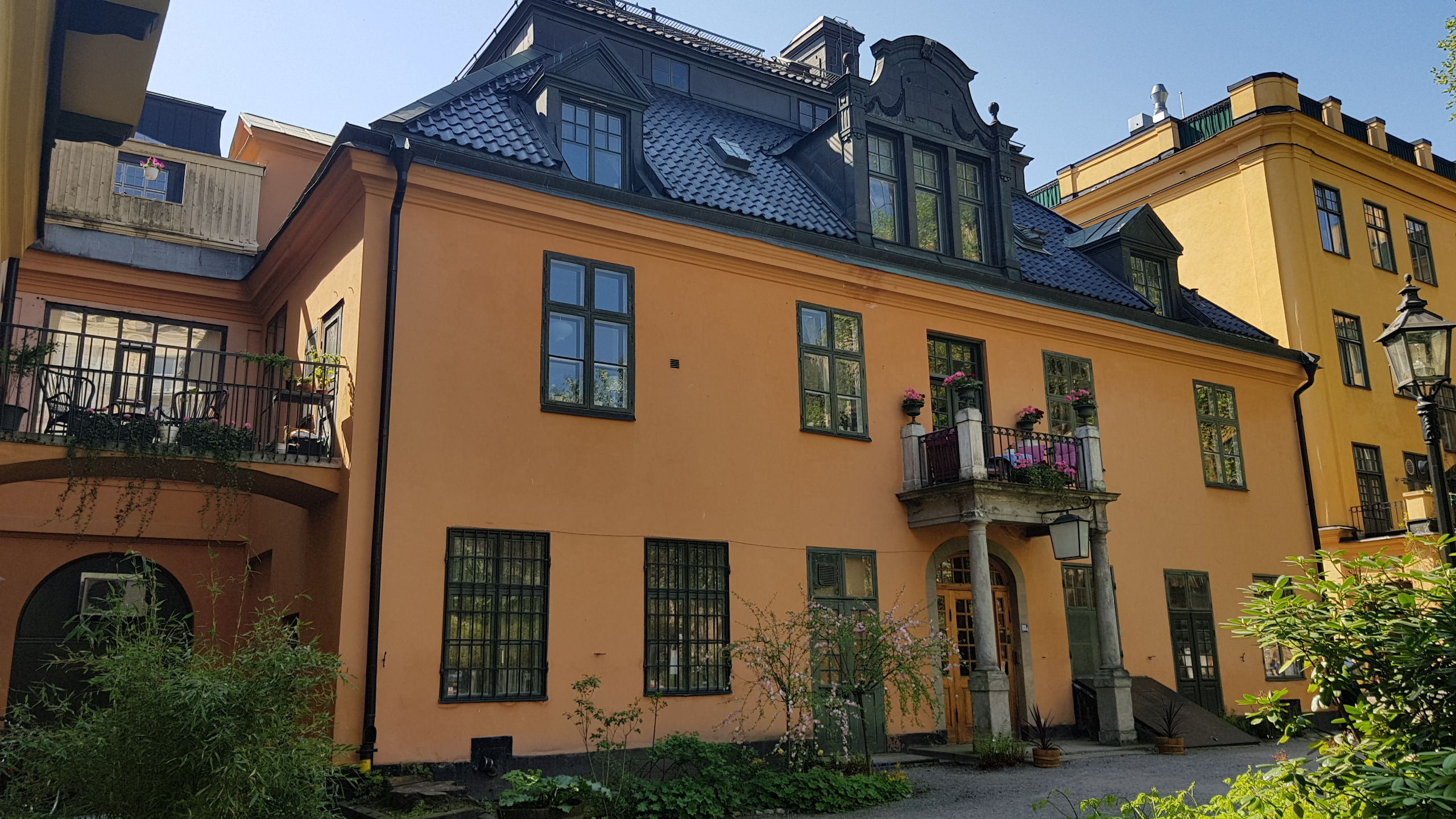 Hårlemanska huset sett från Centralbadsparken